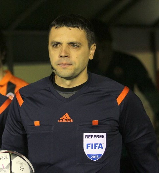 Анатолій Абдула - український футбольний арбітр